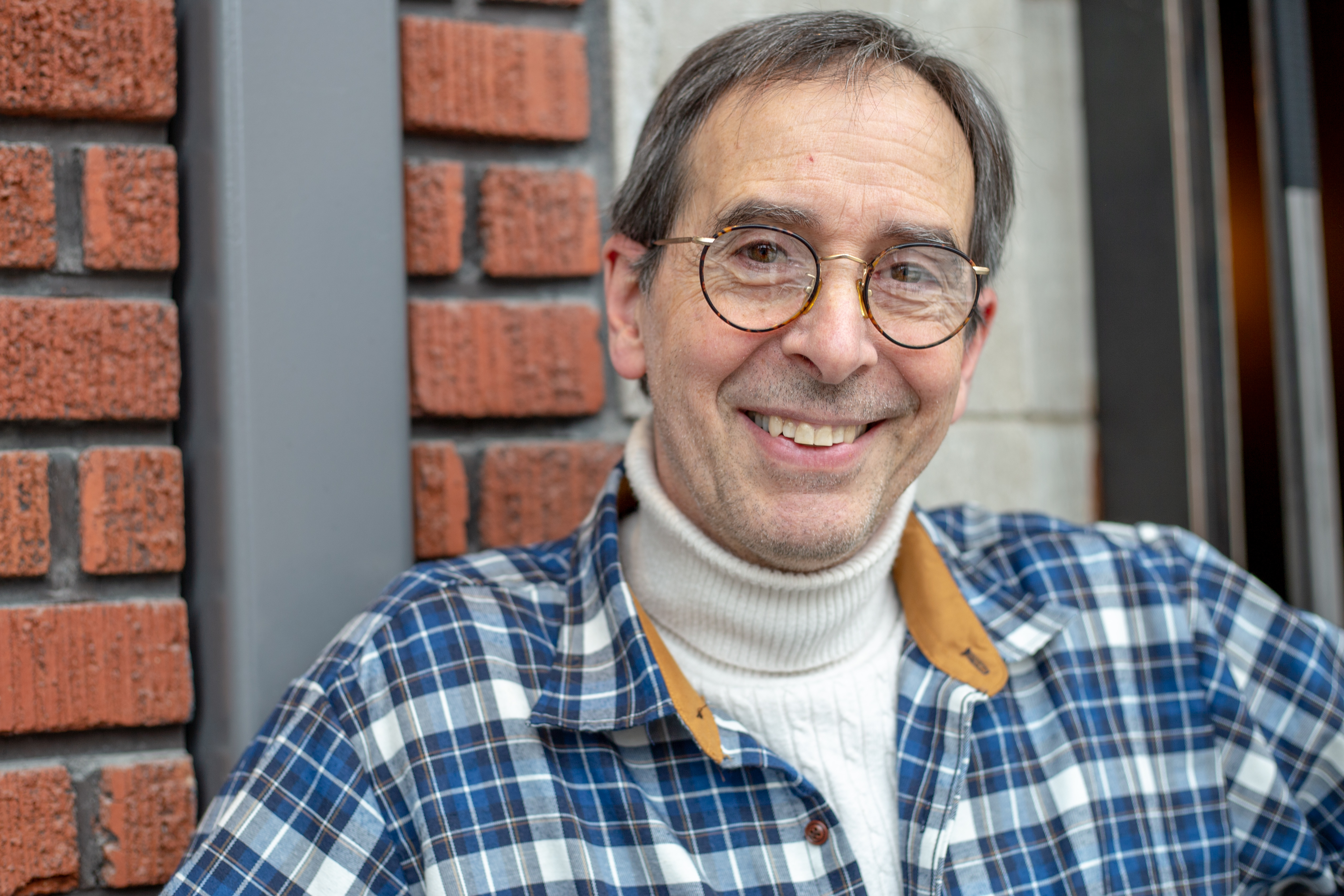 Portrait du cinéaste d'animation Steven Woloshen réalisé à la Cinémathèque québécoise.